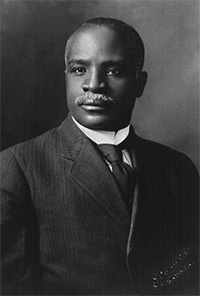 Retrat de Kelly Miller (1863-1939), matemàtic, sociòleg i intel·lectual nord-americà.